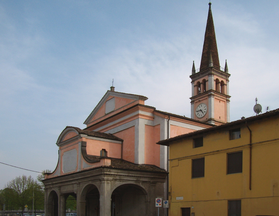 kirko Sanktaj Roĥo kaj Sebastiano en Pizzighettone, Lombardio, Italio